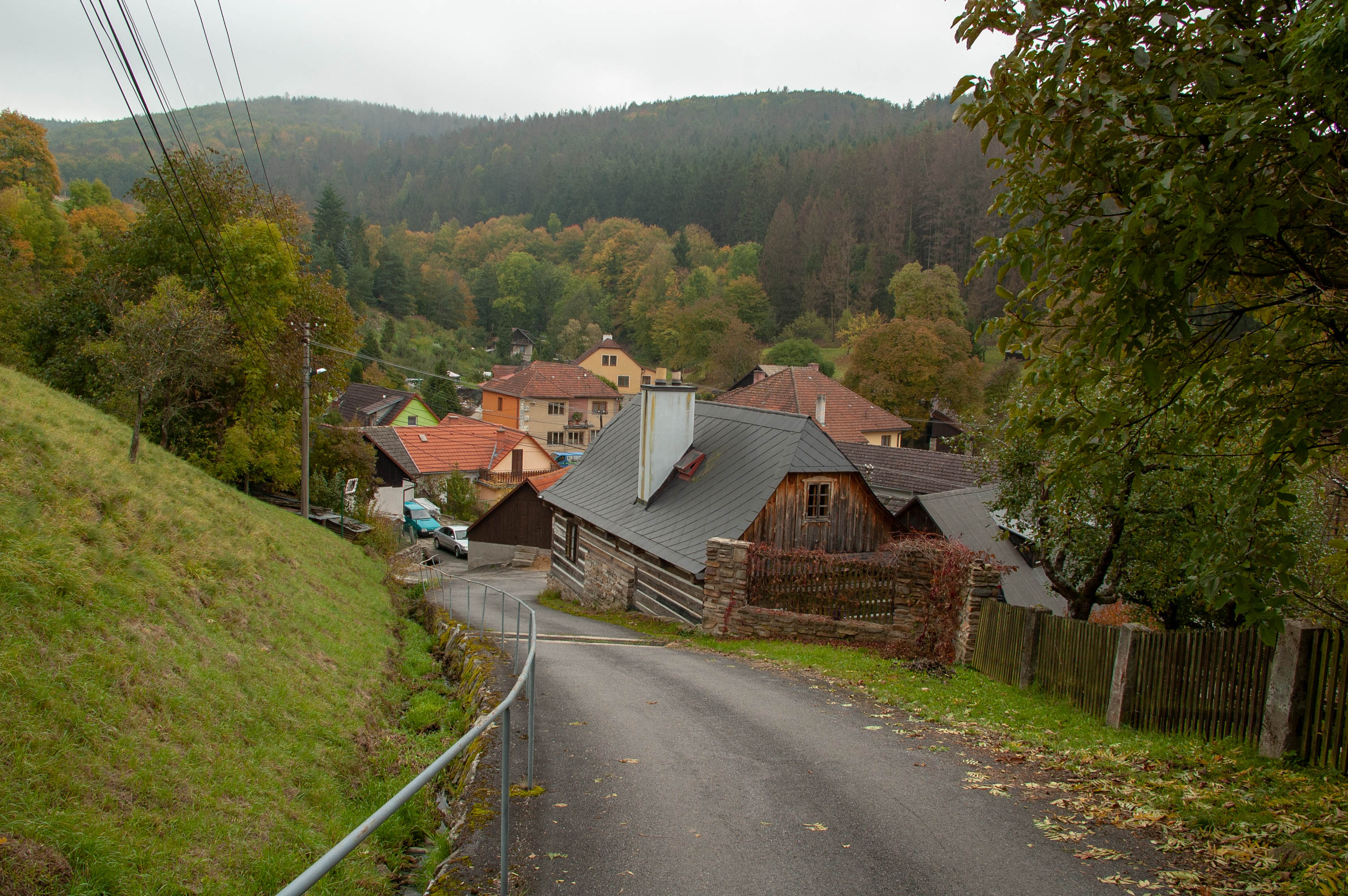 Pohled na dolní část Chléského